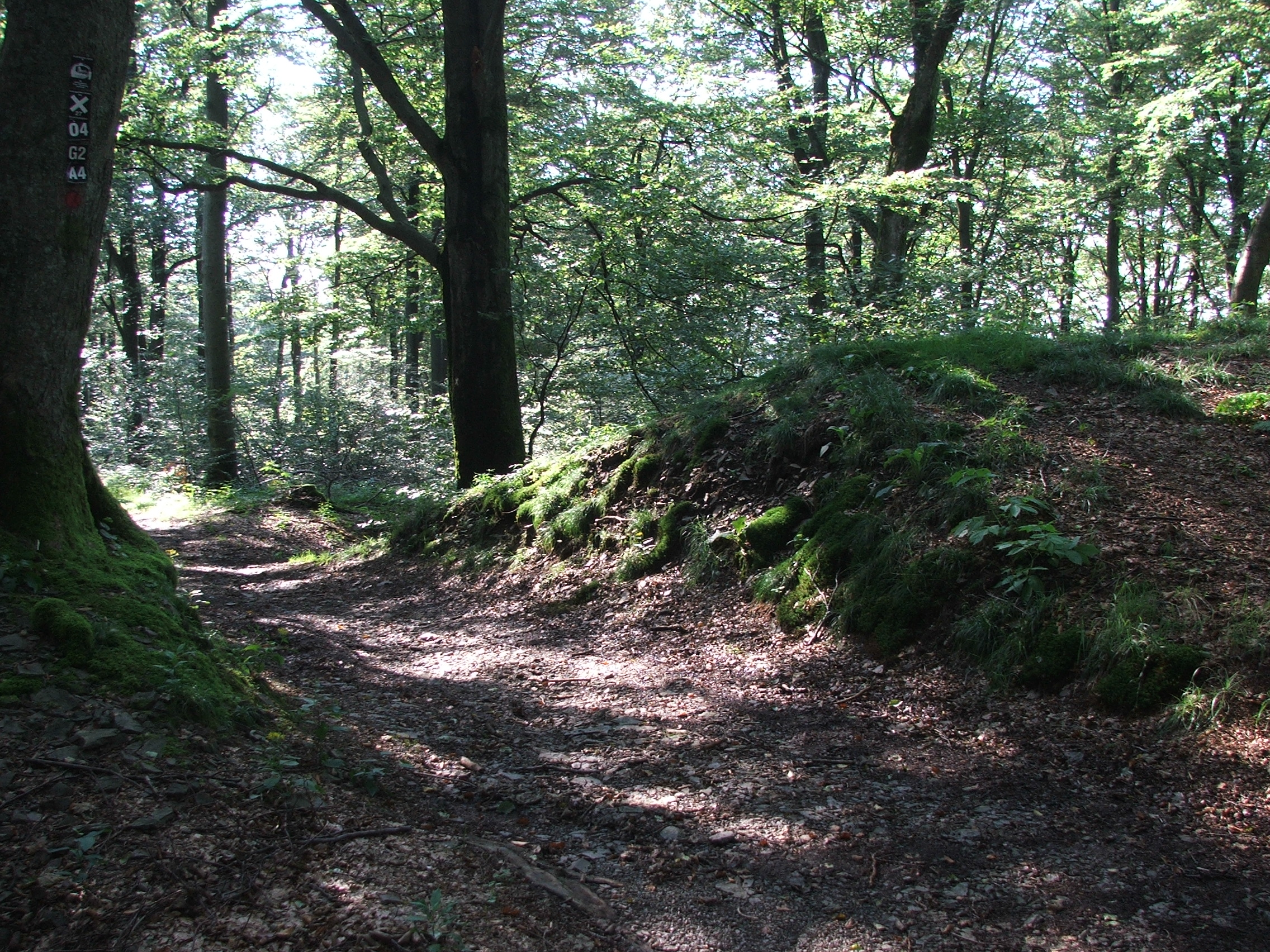 Torsituation auf dem Wilzenberg, Schmallenberg, Deutschland; Wald im Naturschutzgebiet „Wilzenberg“